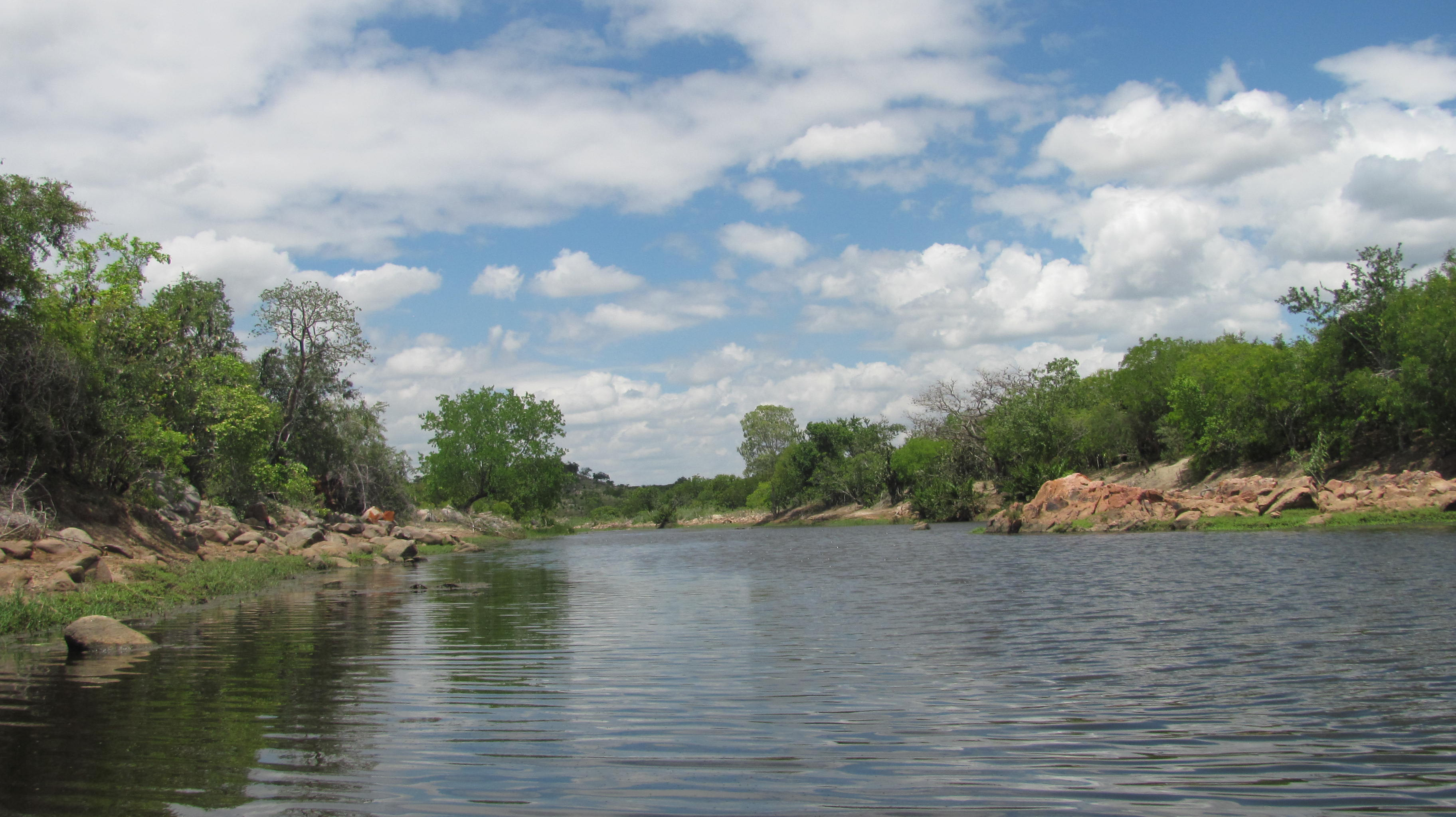 Foto do Rio da Roda na região do povoado de Bela Vista na cidade de Araci da Bahia